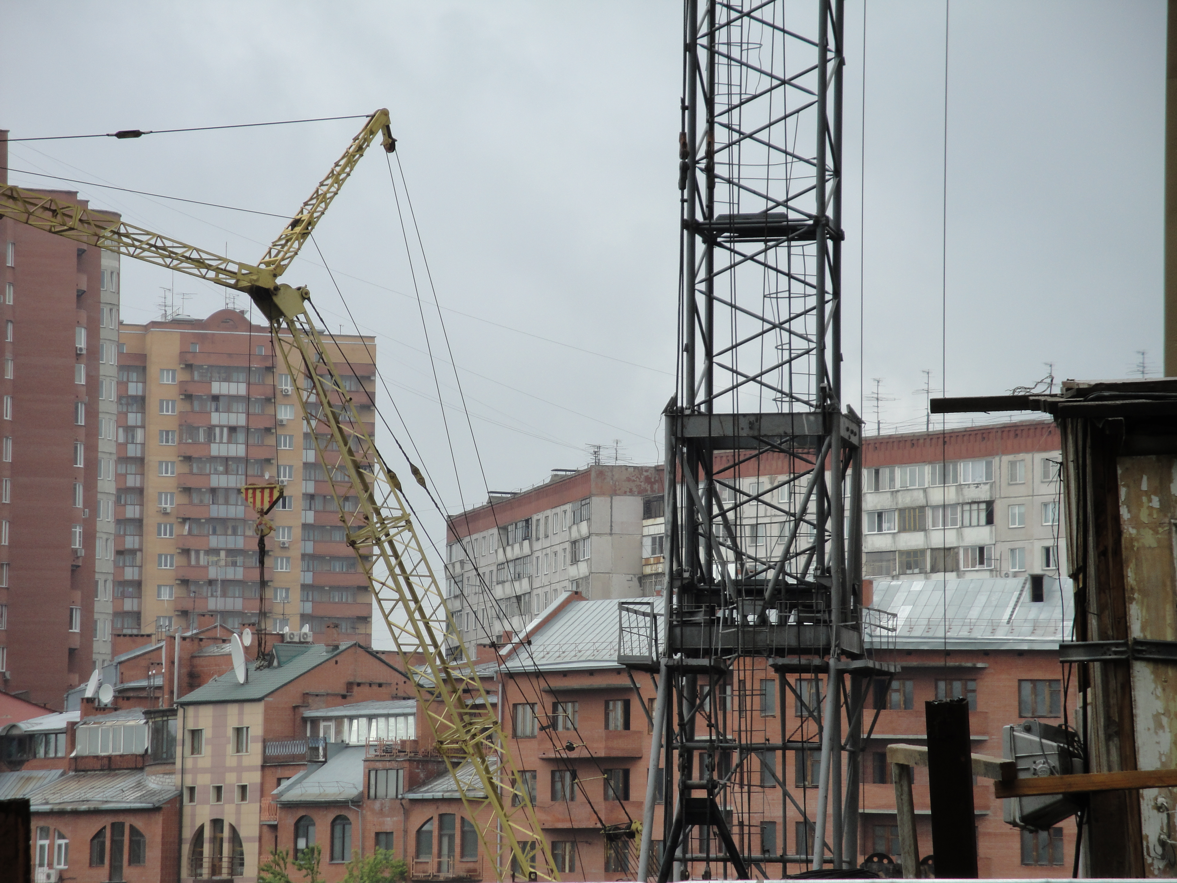 Кран КБ-405-2А - Нижняя часть конструкции крана (Портал - вид сзади). На заднем плане виден КС-5363.